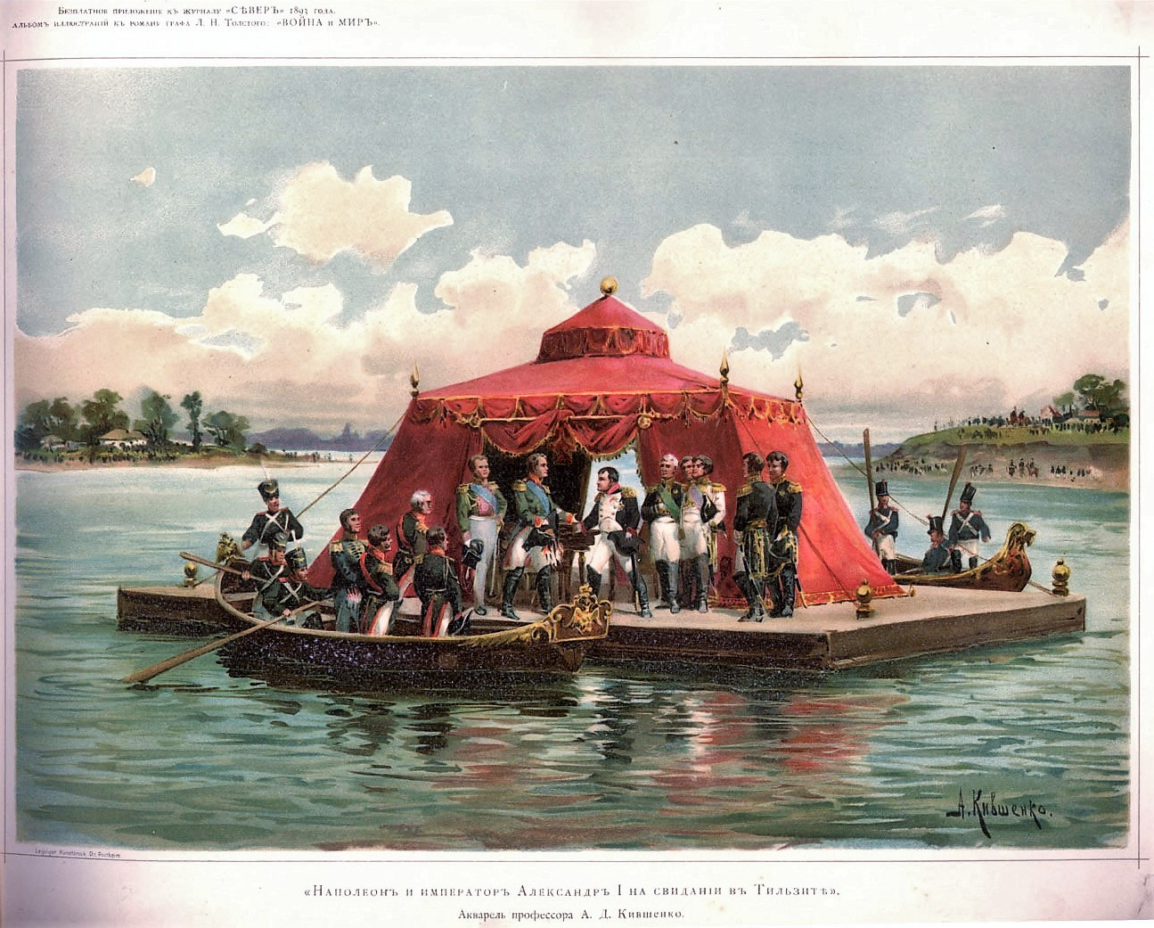 Это акварель русского художника Алексея Кившенко: «Наполеон и Александр I на свидании в Тильзите». Иллюстрация к книге Льва Толстого «Война и Мир».